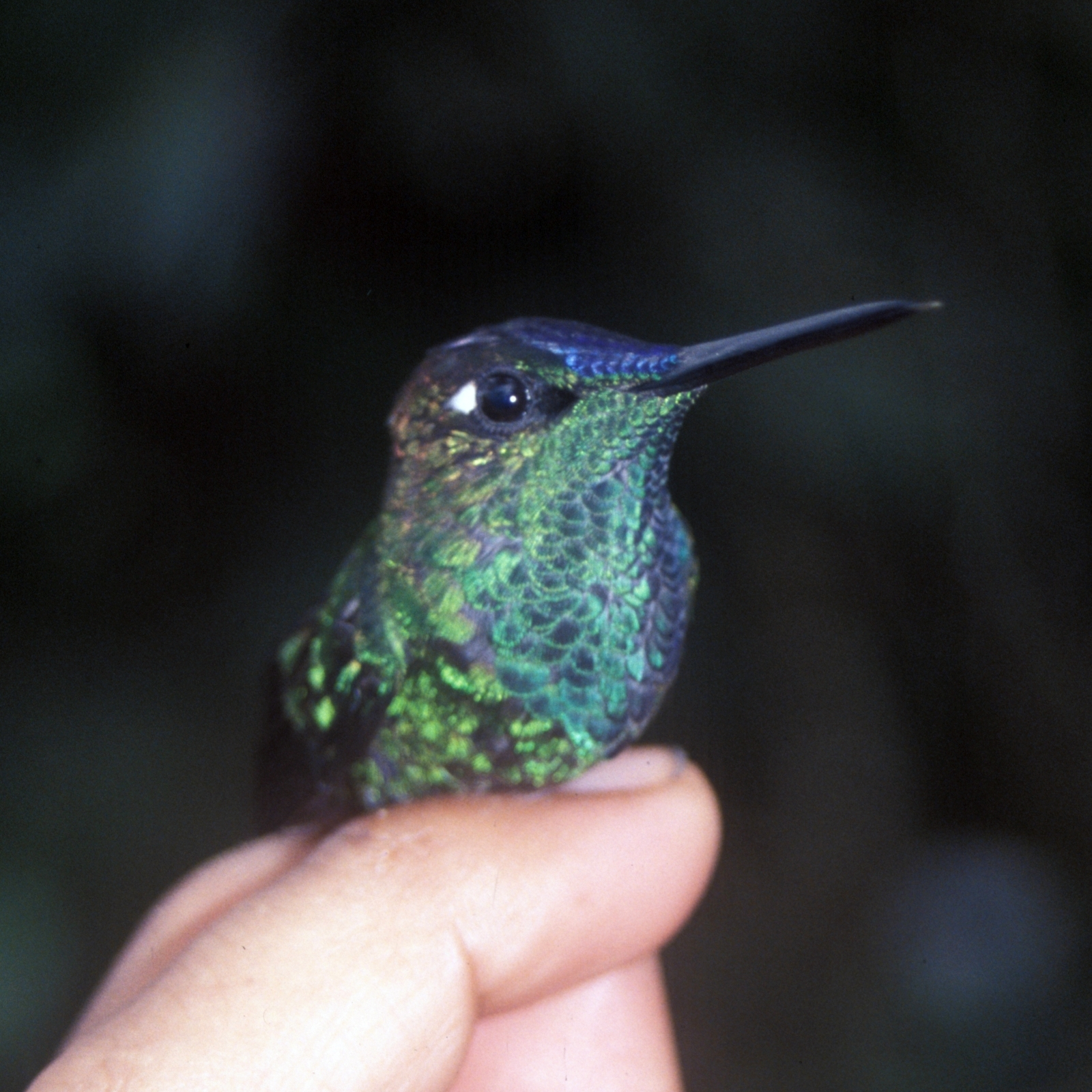 Violet-fronted Brilliant (Heliodoxa leadbeateri). Male from Cordillera del Cóndor, Ecuador